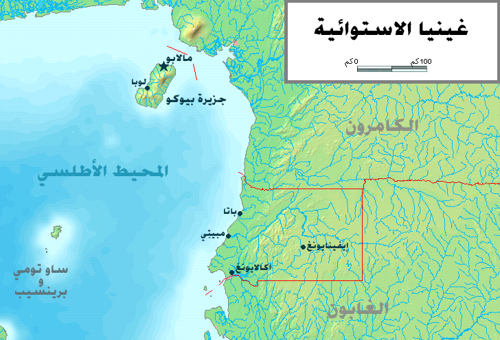 خريطة غينيا الاستوائية.